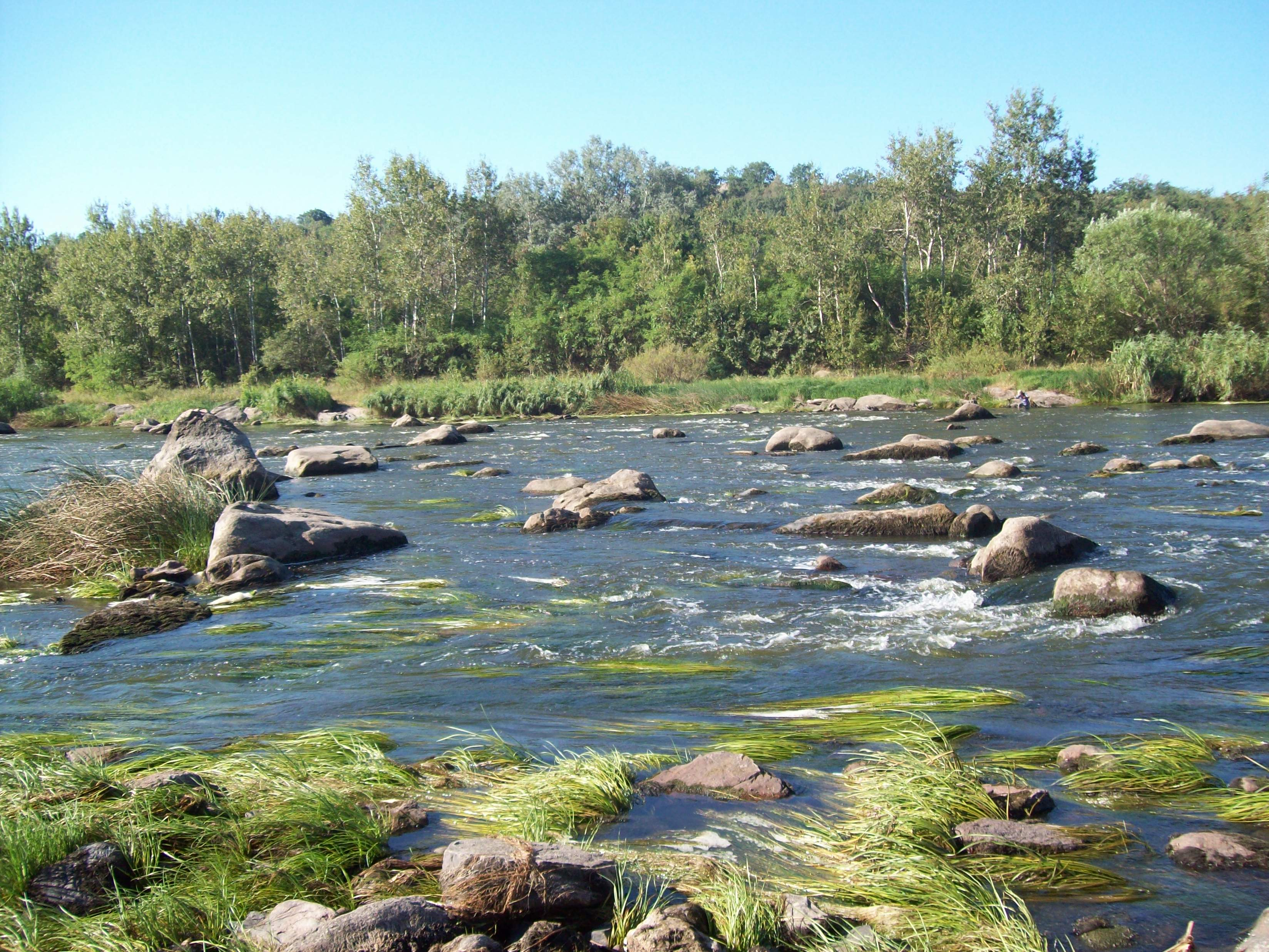 Пороги поблизу Куріпчиного